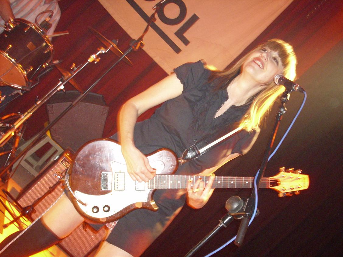 Sala El Sol Madrid , 20 Febrero 2009